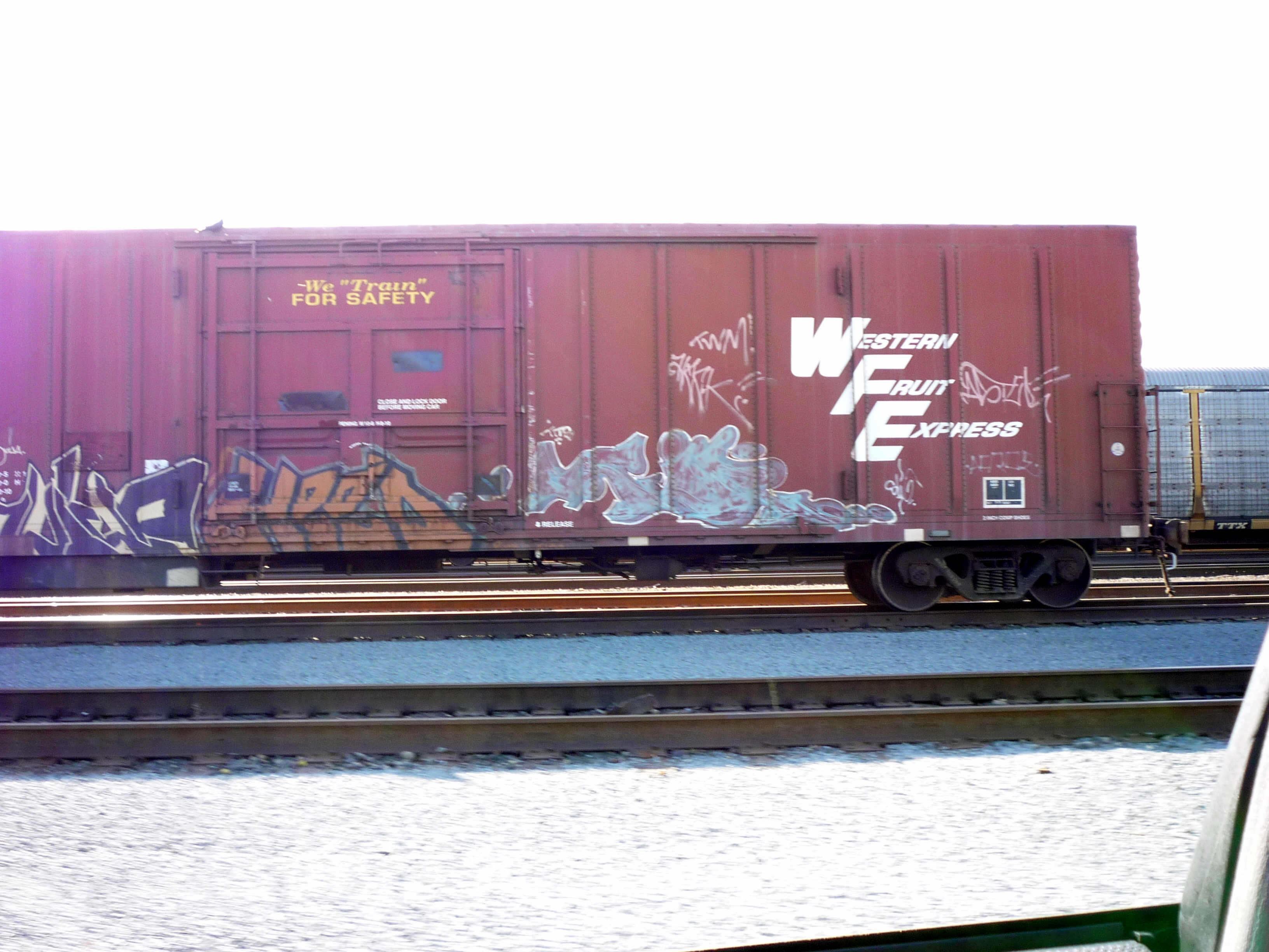 Heed, (?)